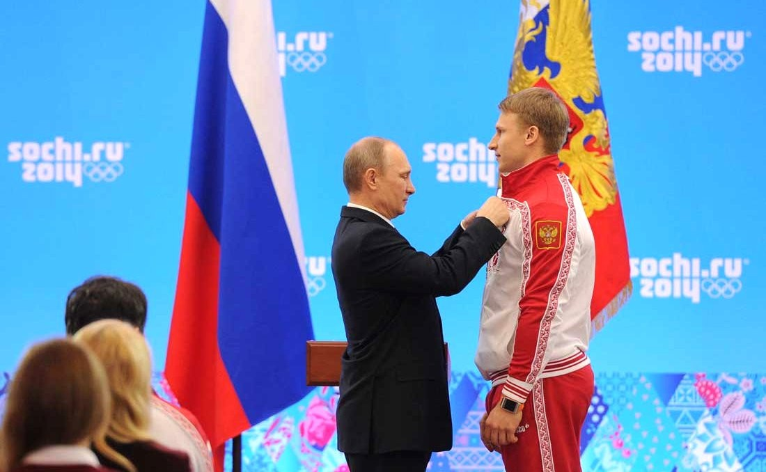 Орденом Дружбы награжден олимпийский чемпион в бобслее Дмитрий Труненков.